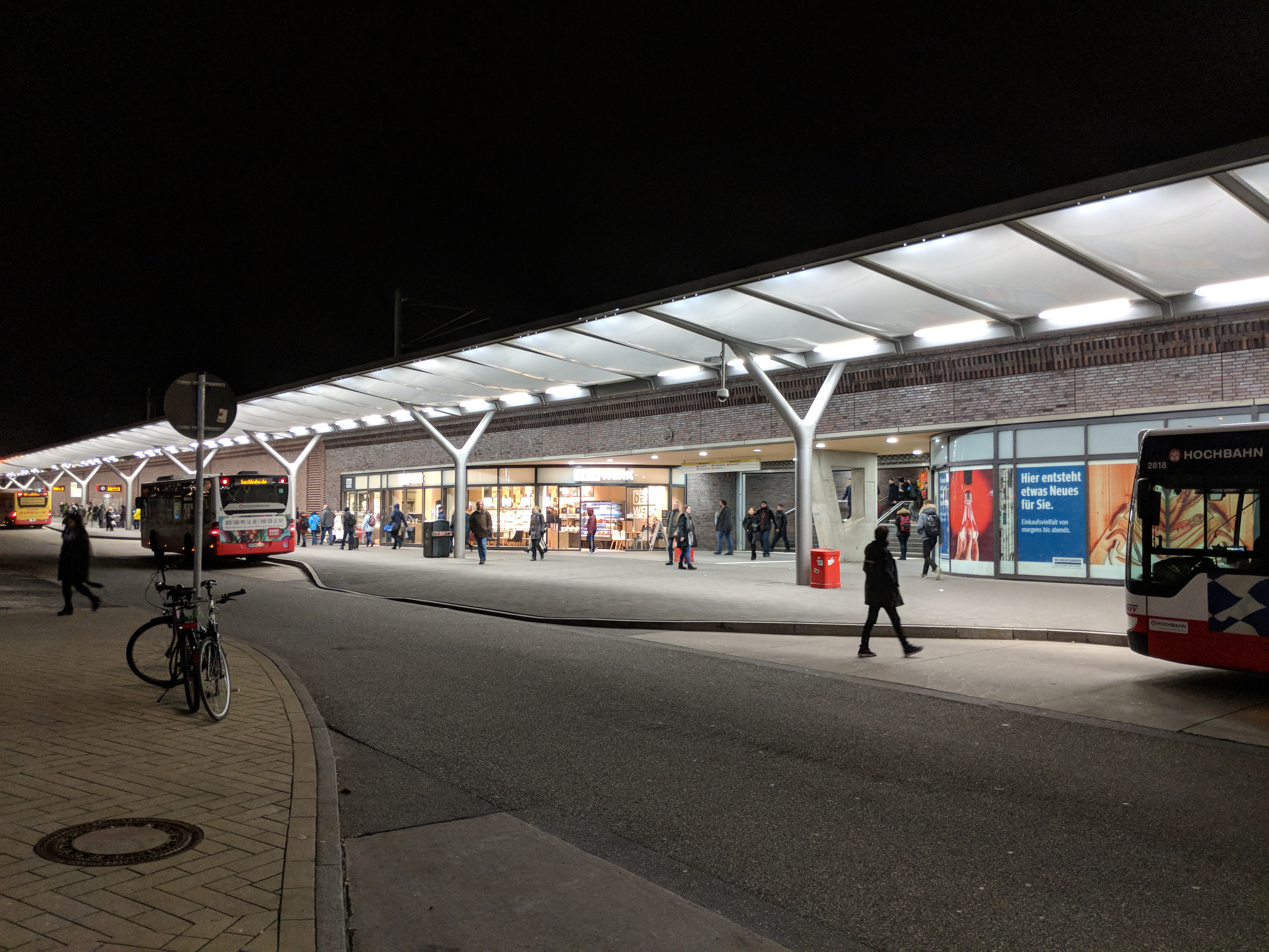 Busbahnhof am Bahnhof Hamburg-Barmbek